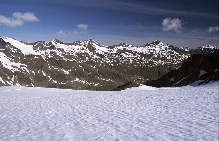 Der gesamte Kreuzkamm vom Hauslabkogel ganz links über Saykogel, Sennkogel, Kreuzkogel bis zur Kreuzspitze (von Südosten), Ötztaler Alpen, Tirol, Österreich